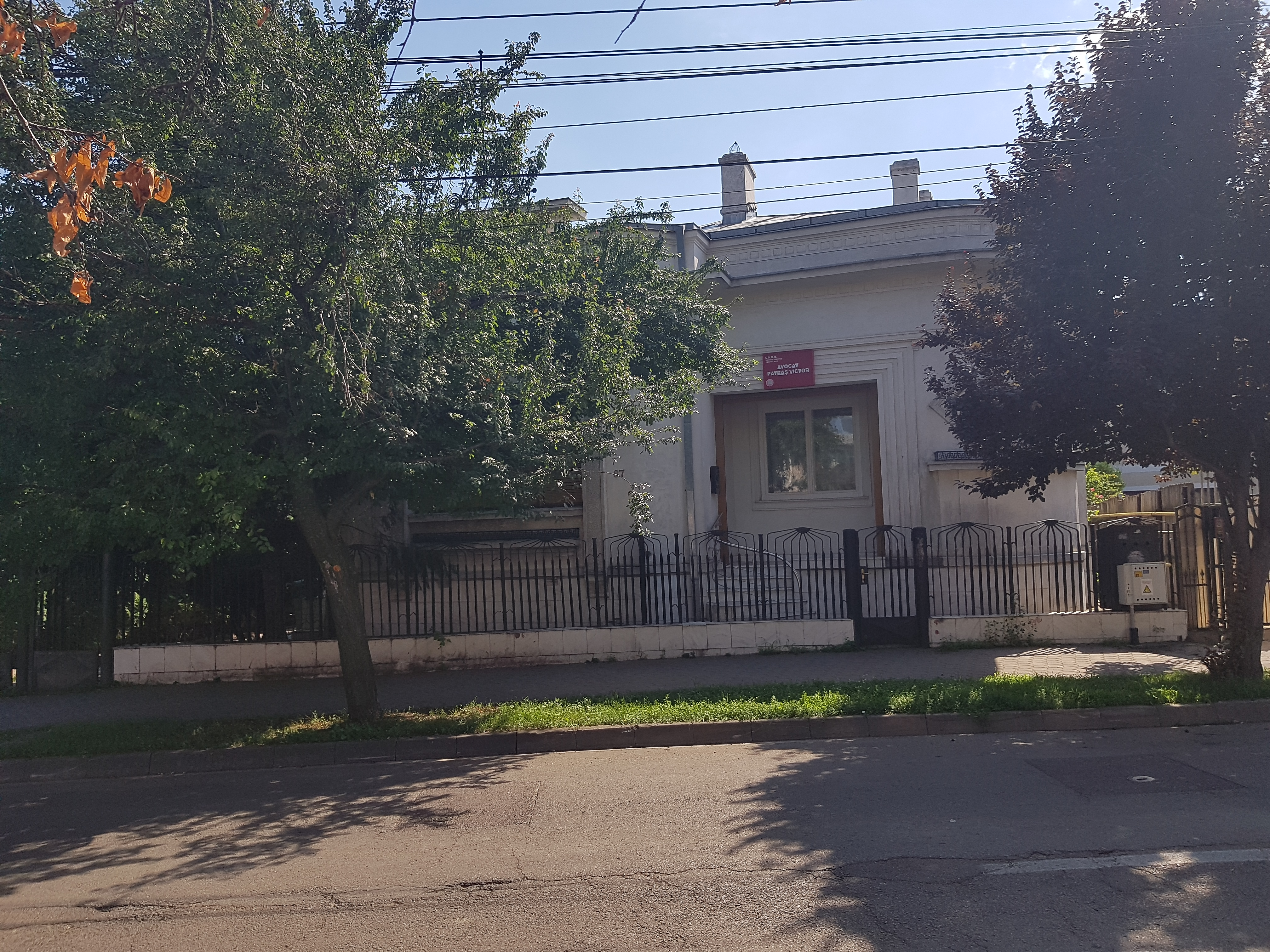 Monument istoric